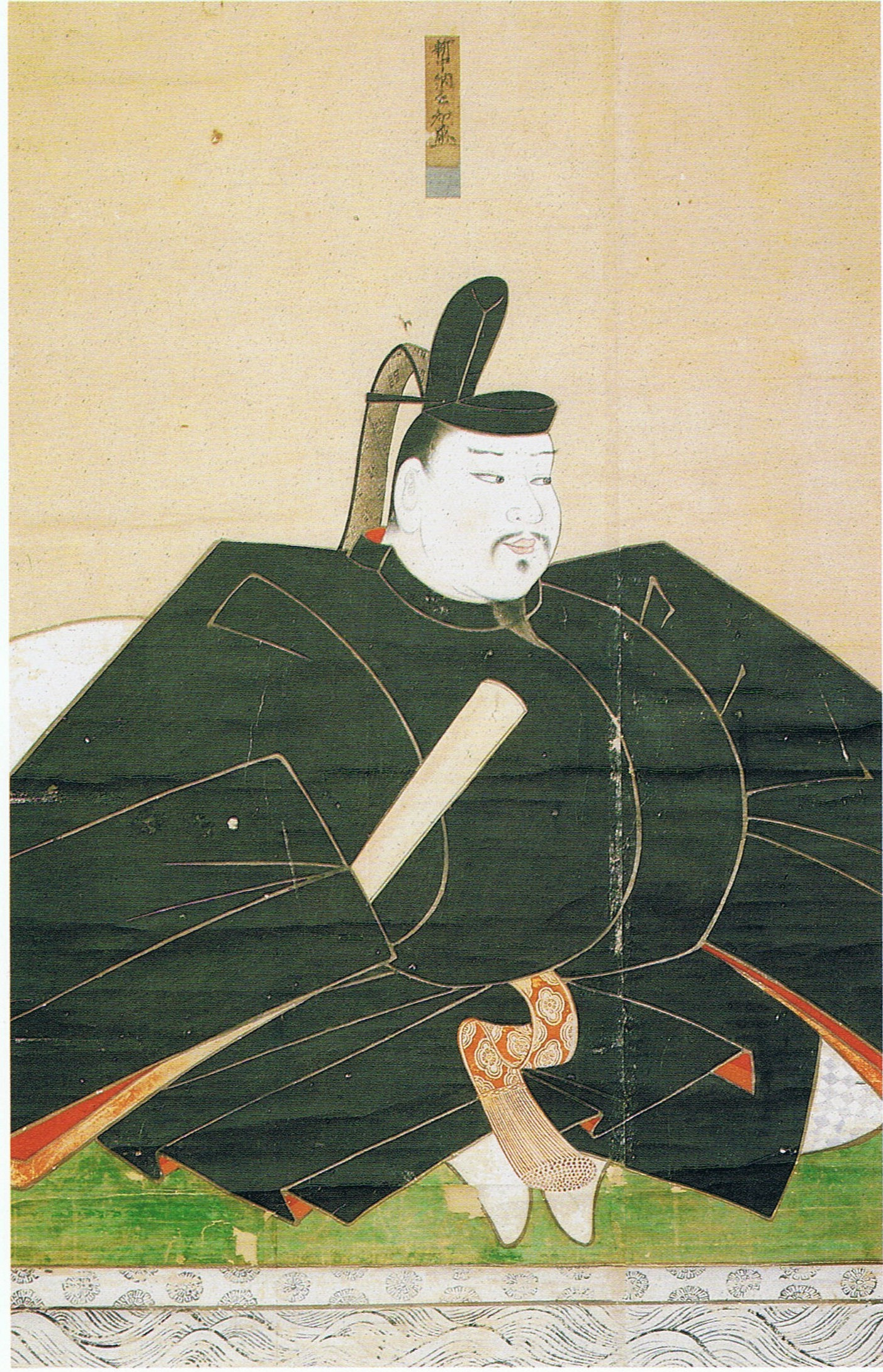 平知盛像